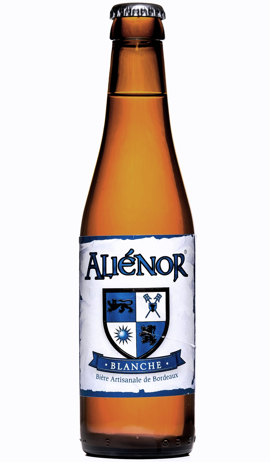 Bouteille de bière Aliénor Blanche, brassée à Saint-Caprais-de-Bordeaux, en France.